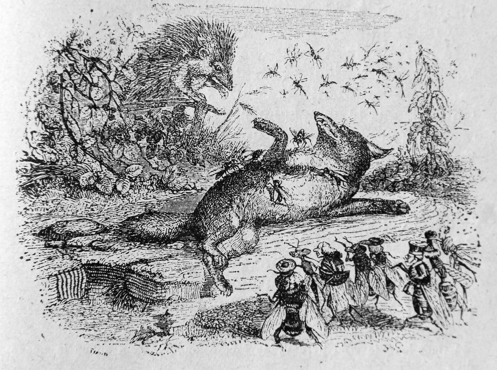 J.J. Grandville. Illustrations des Fables de La Fontaine. 1838-1840.